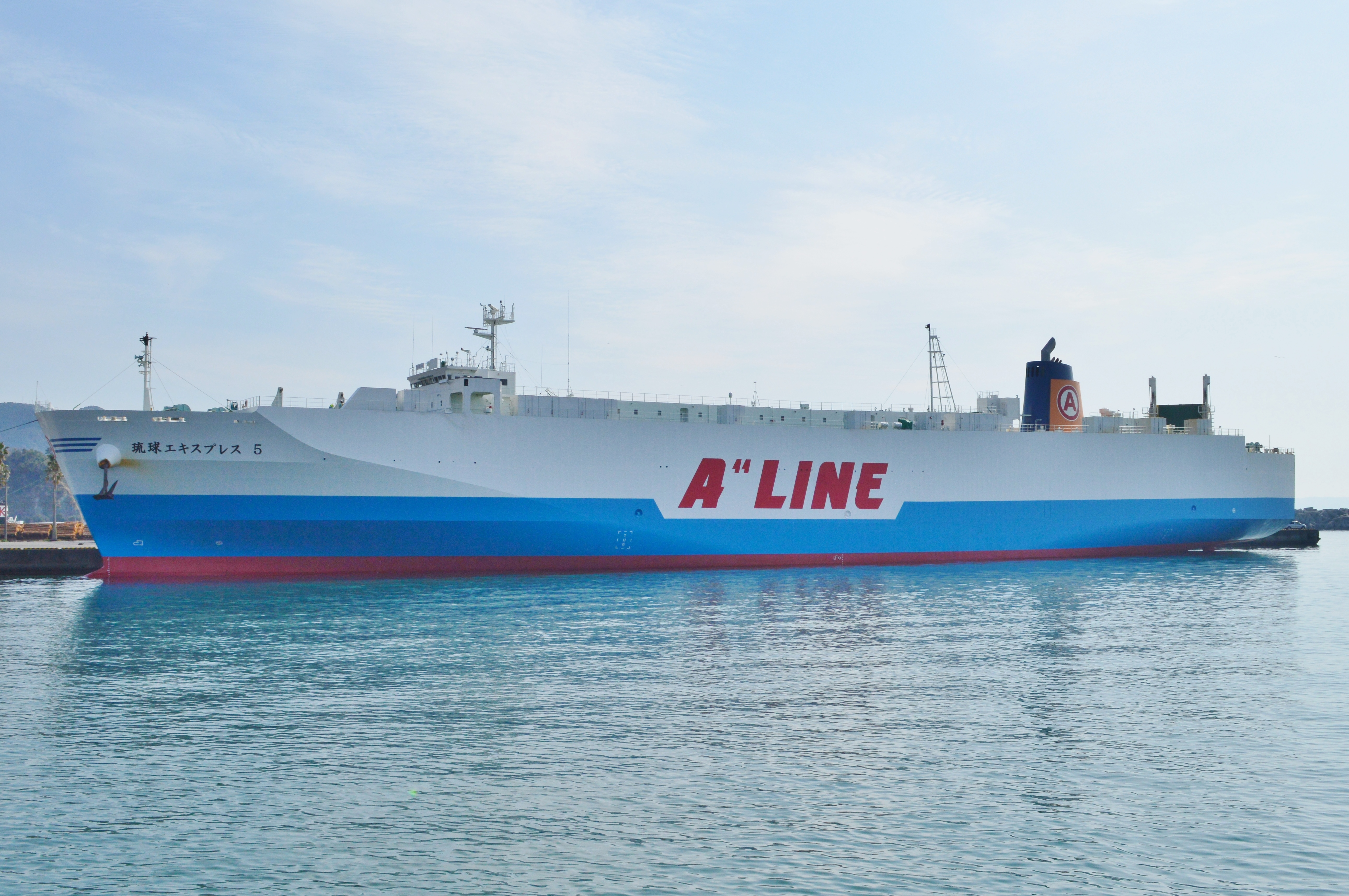 琉球エキスプレス5 (志布志港にて)